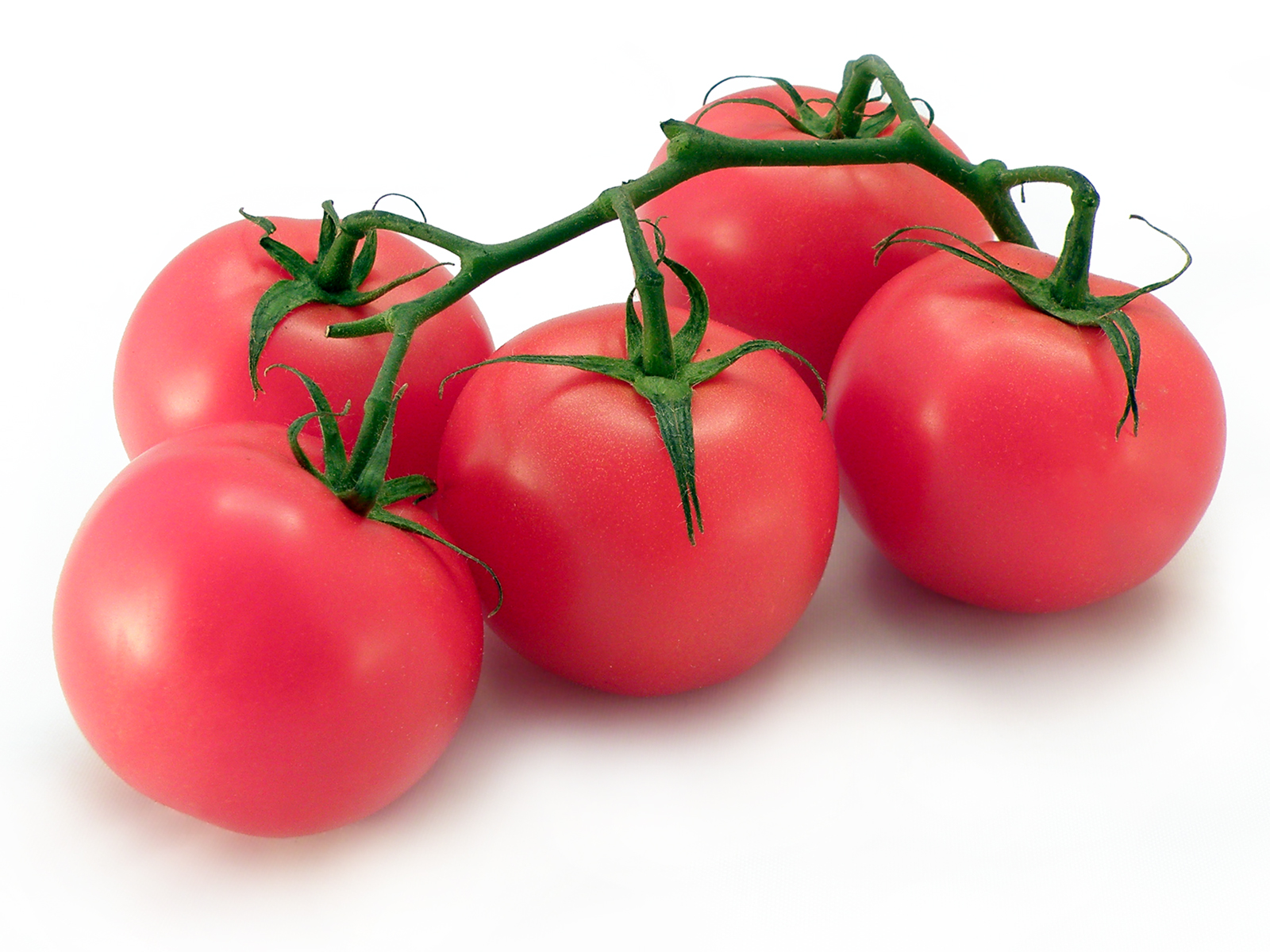 Pomidory